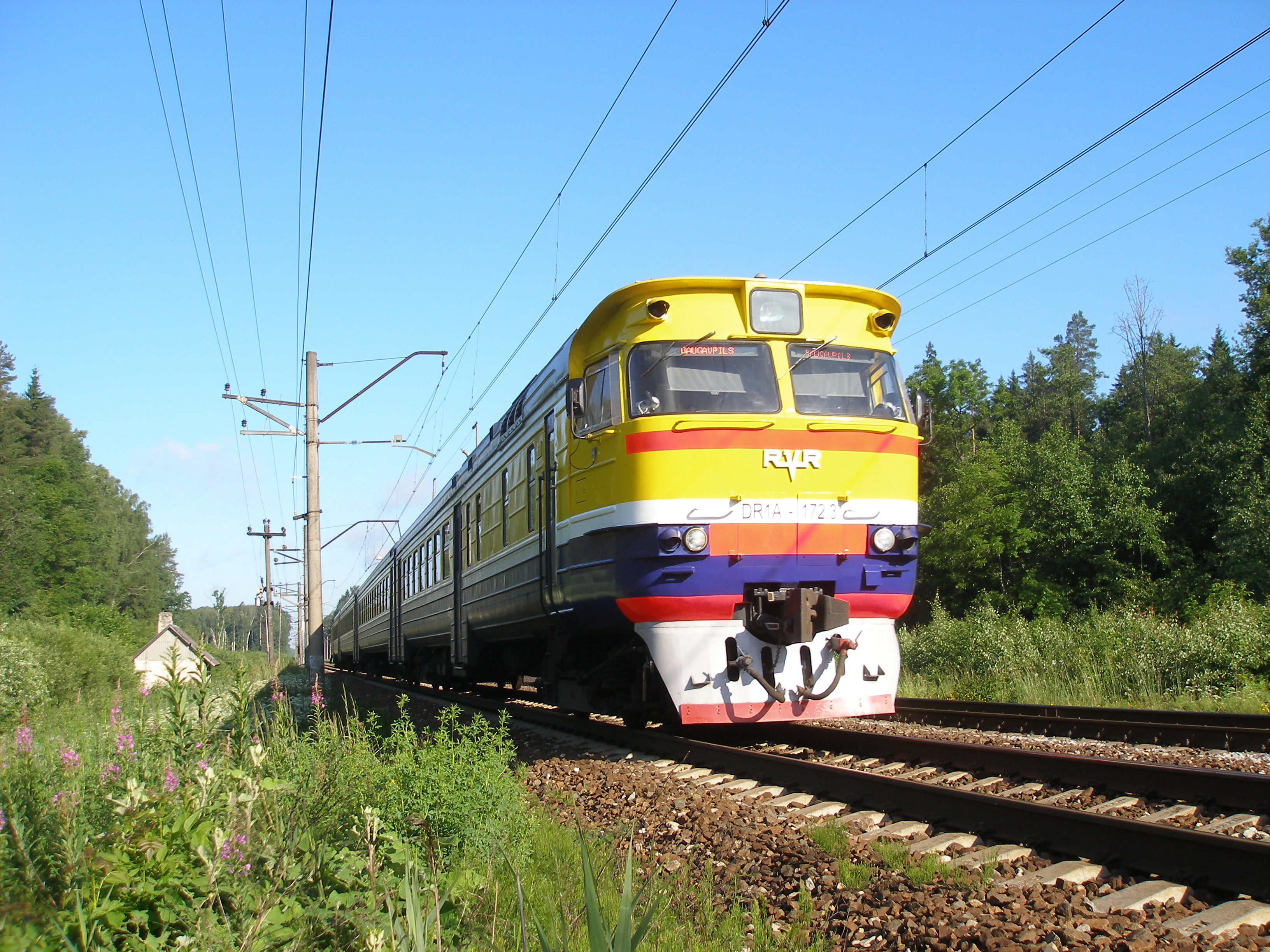 Dīzeļvilciens DR1A-172 pie Dendrārija pieturas punkta